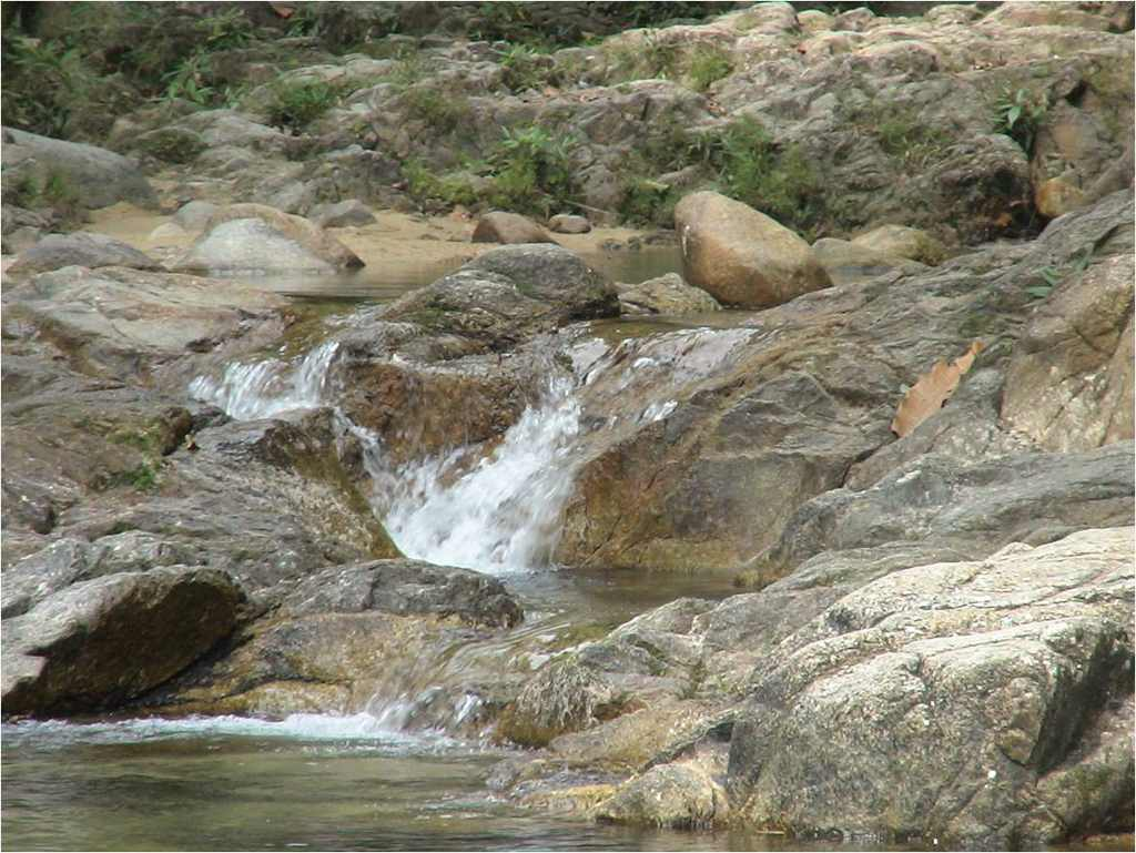 Jeram Mengaji / Jeram Mak Nenek ini baru dibuka pada tahun 2005 dan masih dalam pembangunan. Ia terletak lebih kurang 6 km dari Pekan Selising atau 22 km dari Bandar Pasir Puteh. Jeram ini bakal dibangunkan sebagaimana Jeram Pasu dan Jeram Linang. Ia terletak di kawasan pedalaman dan belum diketahui oleh orang ramai. Jeram ini sesuai untuk aktiviti keluarga dan riadah hujung minggu. Jeram ini akan dibangunkan sepenuhnya untuk kunjungan orang ramai agar ia dapat menjadi salah satu pusat rekreasi yang sedia ada dan dikenali umum.